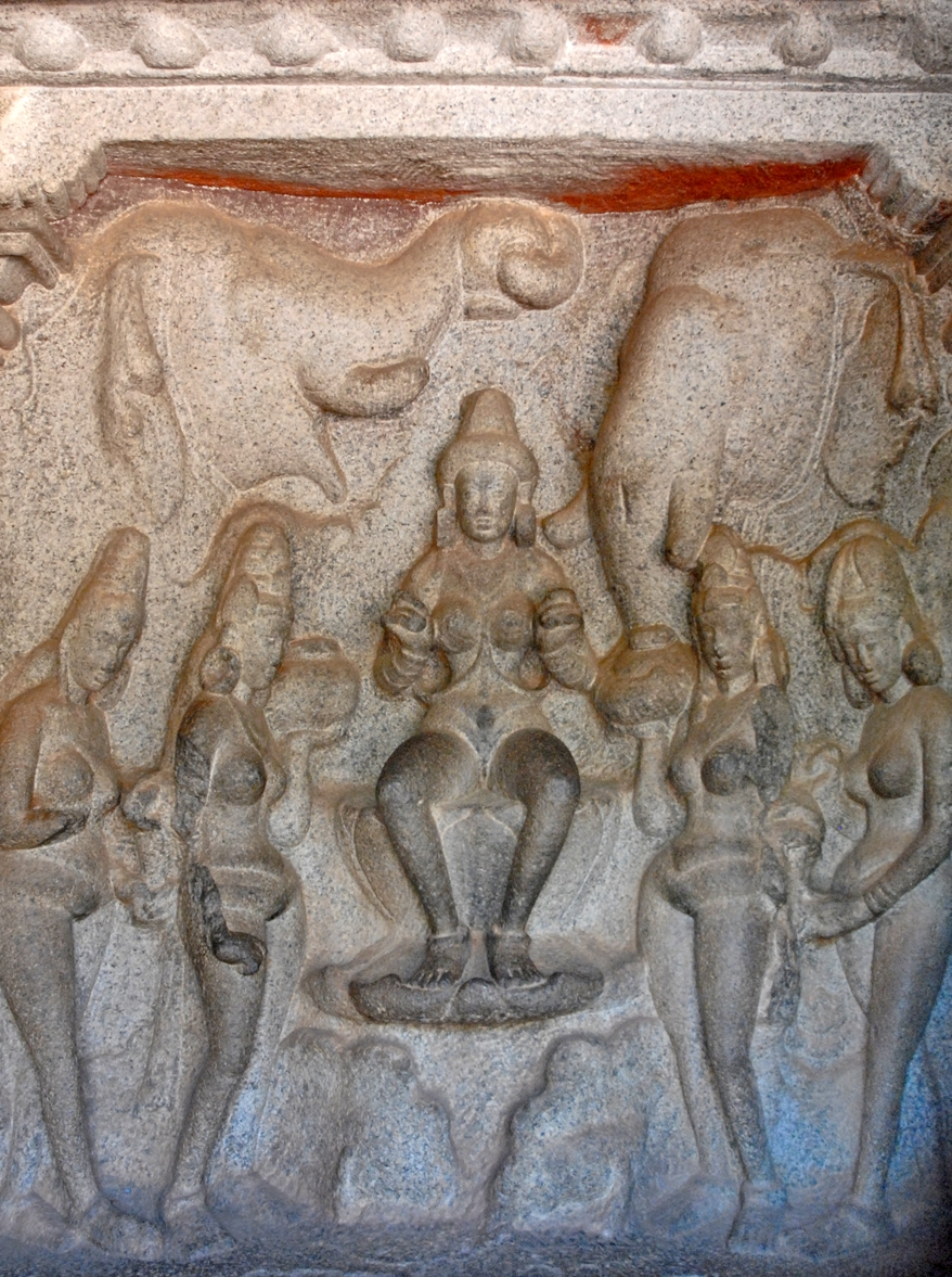 La déesse Laksmi, parèdre de Vishnou, assise sur un lotus et baignée par deux éléphants puisant l'eau dans des jarres tenues par des servantes Ce relief est situé sur la paroi du fond de la grotte de Varaha (le sanglier, troisième avatar de Vishnou) sur le site archéologique de Mahabalipuram article de Wikipedia